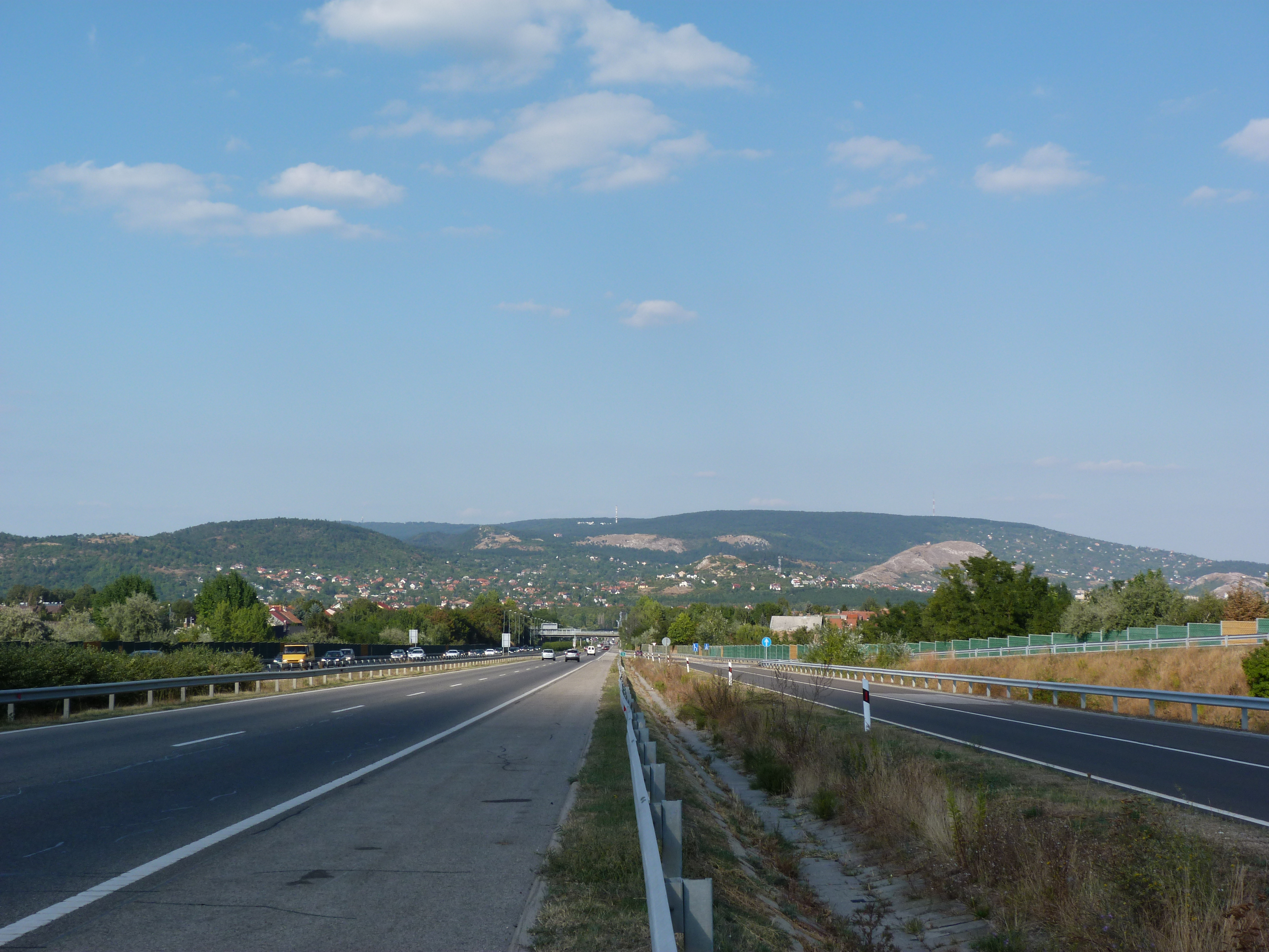 A felvétel 2013. szeptember 6 -án, pénteken készült az M=-es autópálya Budapest felé tartó szakaszán a 15 -ös km -nél. A Budai hegység délnyugatról. ©© Derzsi Elekes Andor, Budapest, 2013, You are authorised to use these photos and vids under Creative Commons – even for commercial, for profit purposes. Photos must be attributed to Derzsi Elekes Andor. All of the photos and vids in the Metapolisz DVD line are under Creative Commons and can be used even for commercial – for profit – purposes. Recommended Citation Derzsi Elekes Andor: Metapolisz DVD line